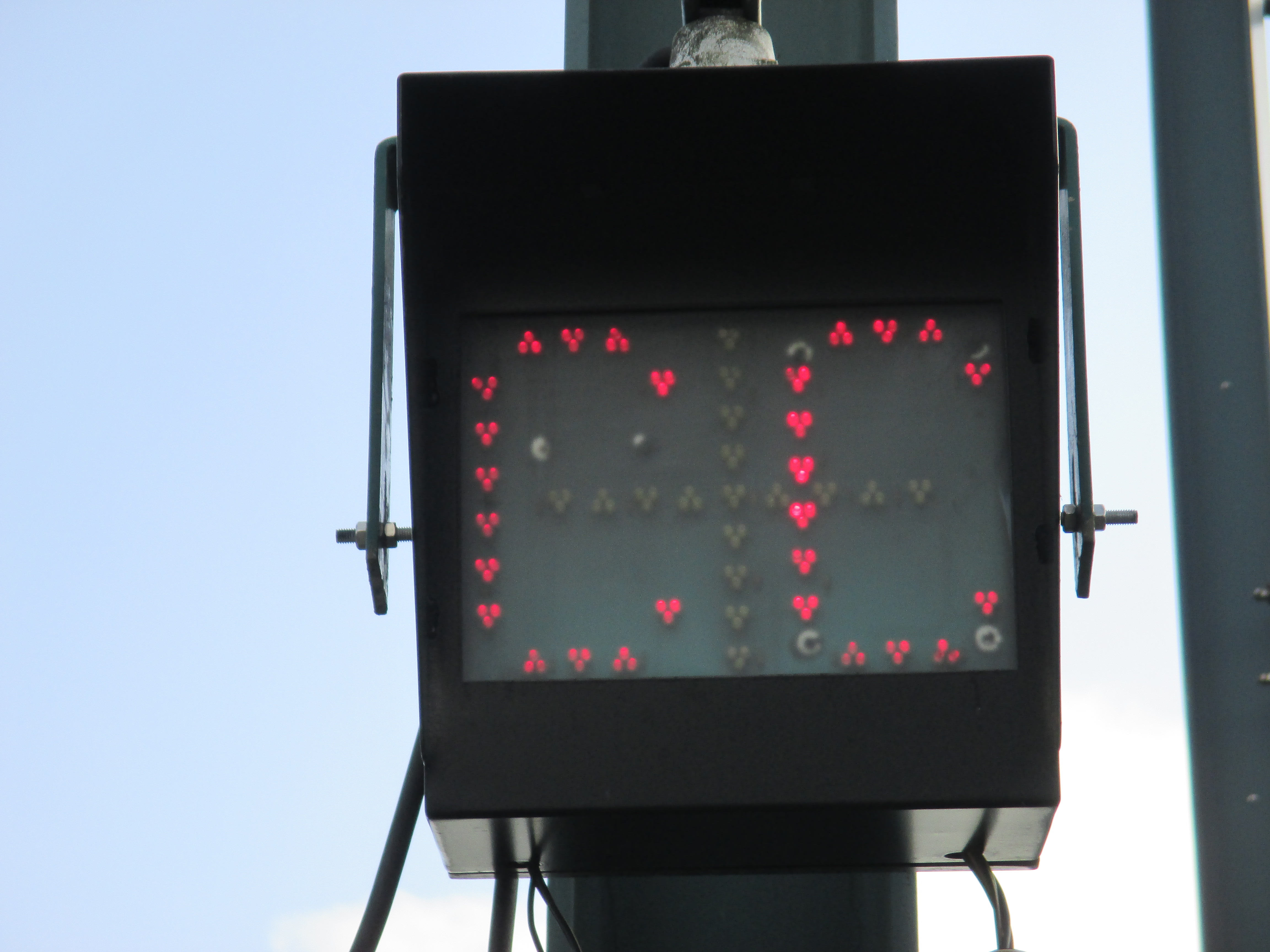 Indicateur de présence tension/IPT ou, dans le cas présent, absence de courant symbolisée par l'affichage des lettres "CC" rouges (= courant continu, 750 V sur le réseau métropolitain lillois). signal "+" allumé (croix verte) = alimentation électrique opérationnelle